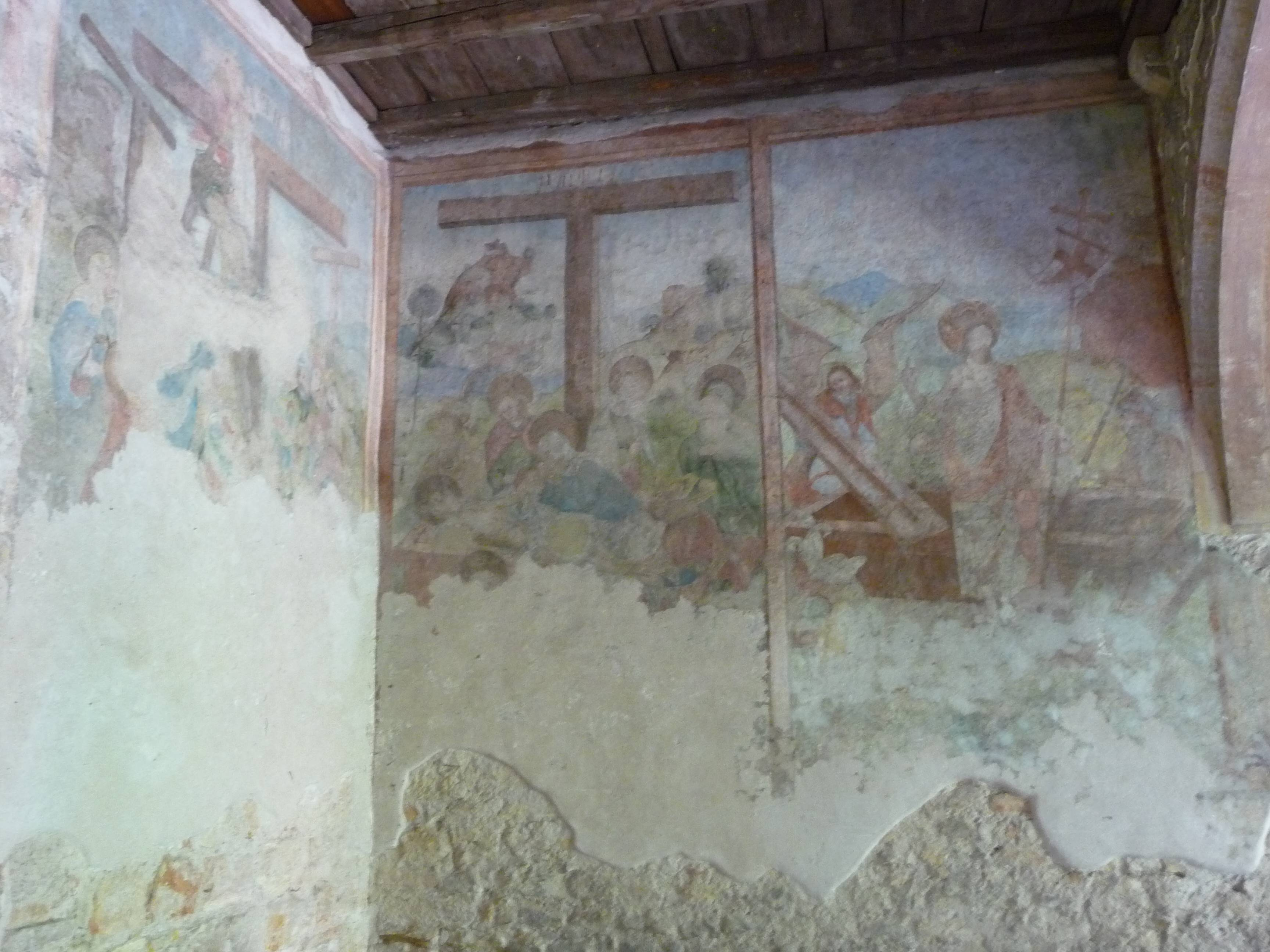 Couvent des Dominicains de Colmar, fresques